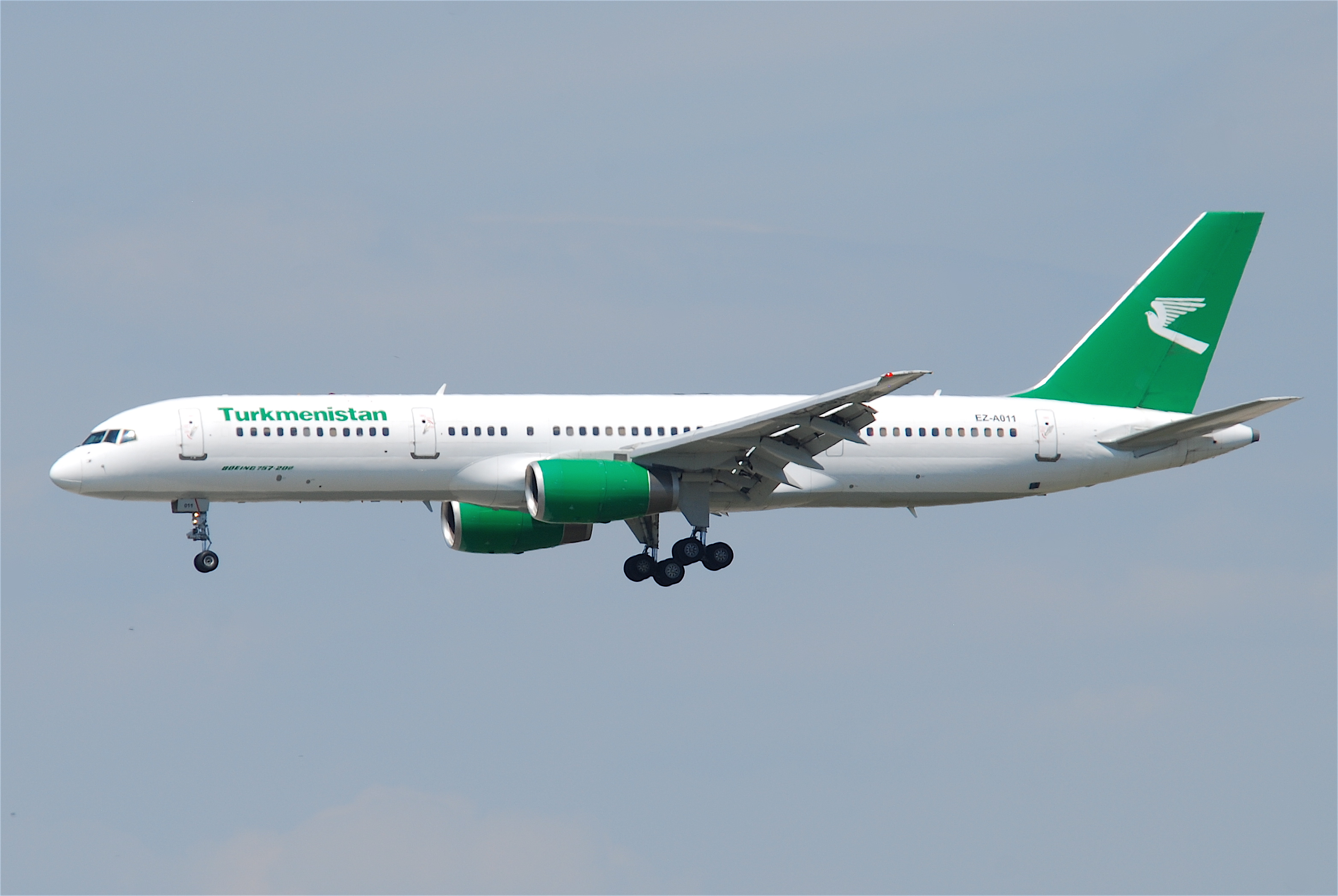 Turkmenistan Airlines Boeing 757-22K; EZ-A011@FRA;16.07.2011/609ie